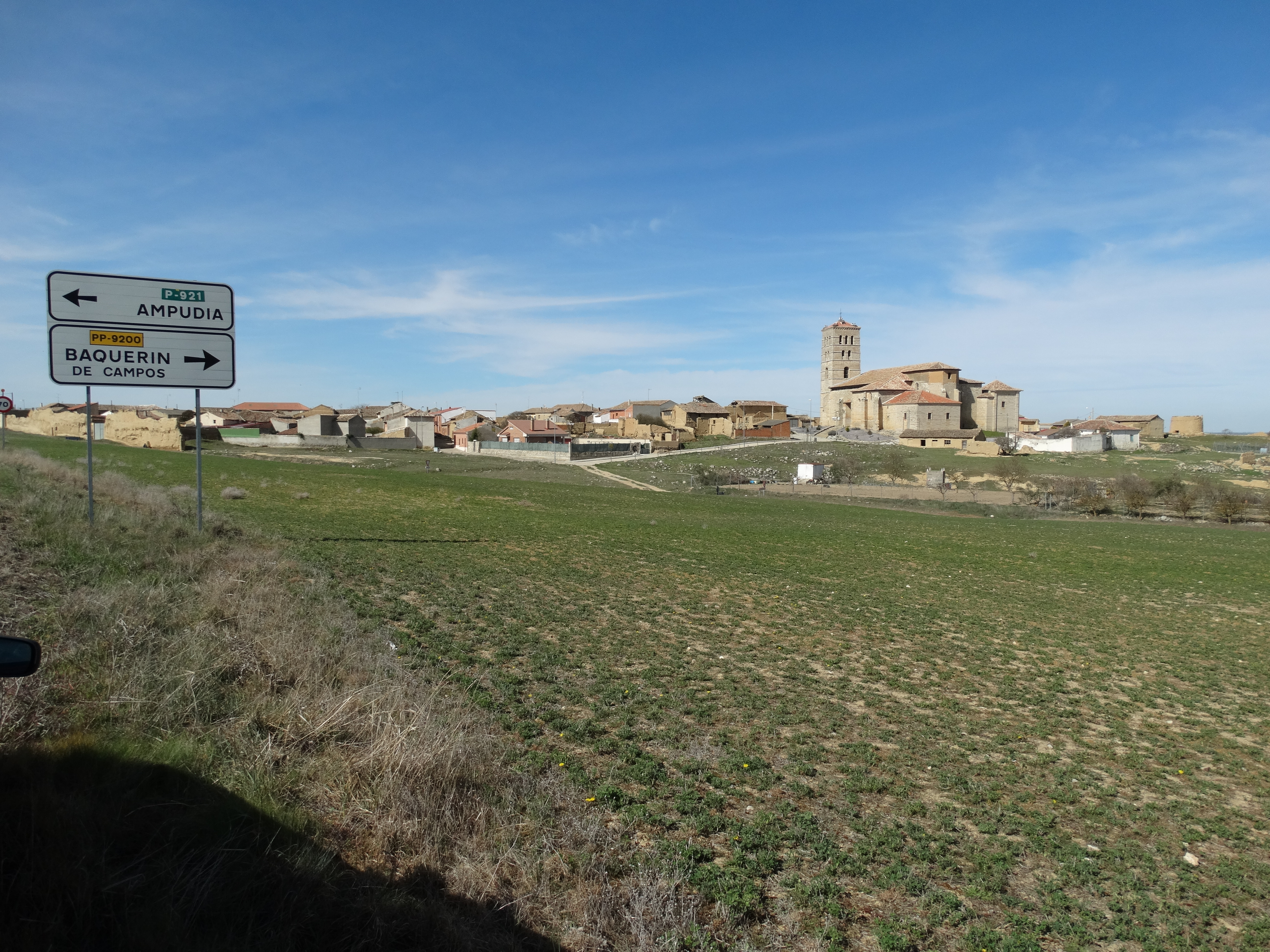 Vista de Torremormojón en Palencia, España.